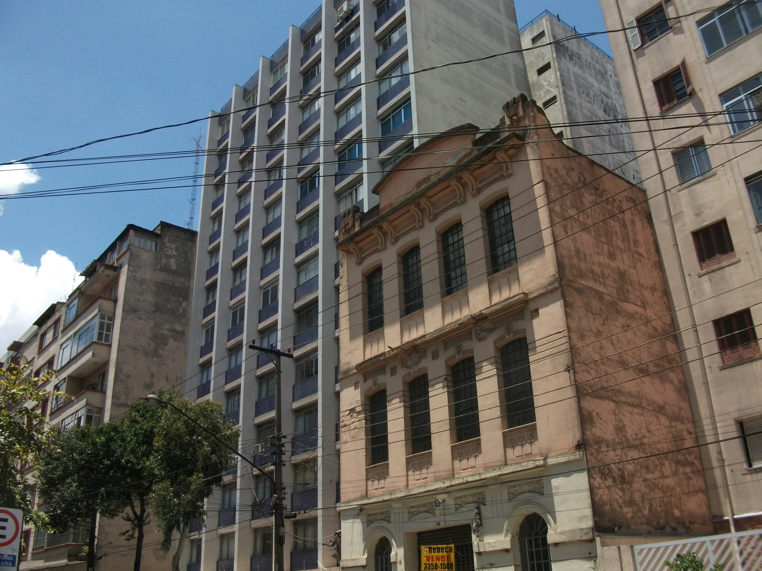 Edifícios da Rua Amazonas, bairro do Bom Retiro na cidade de São Paulo.